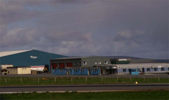 Scatsta terminal